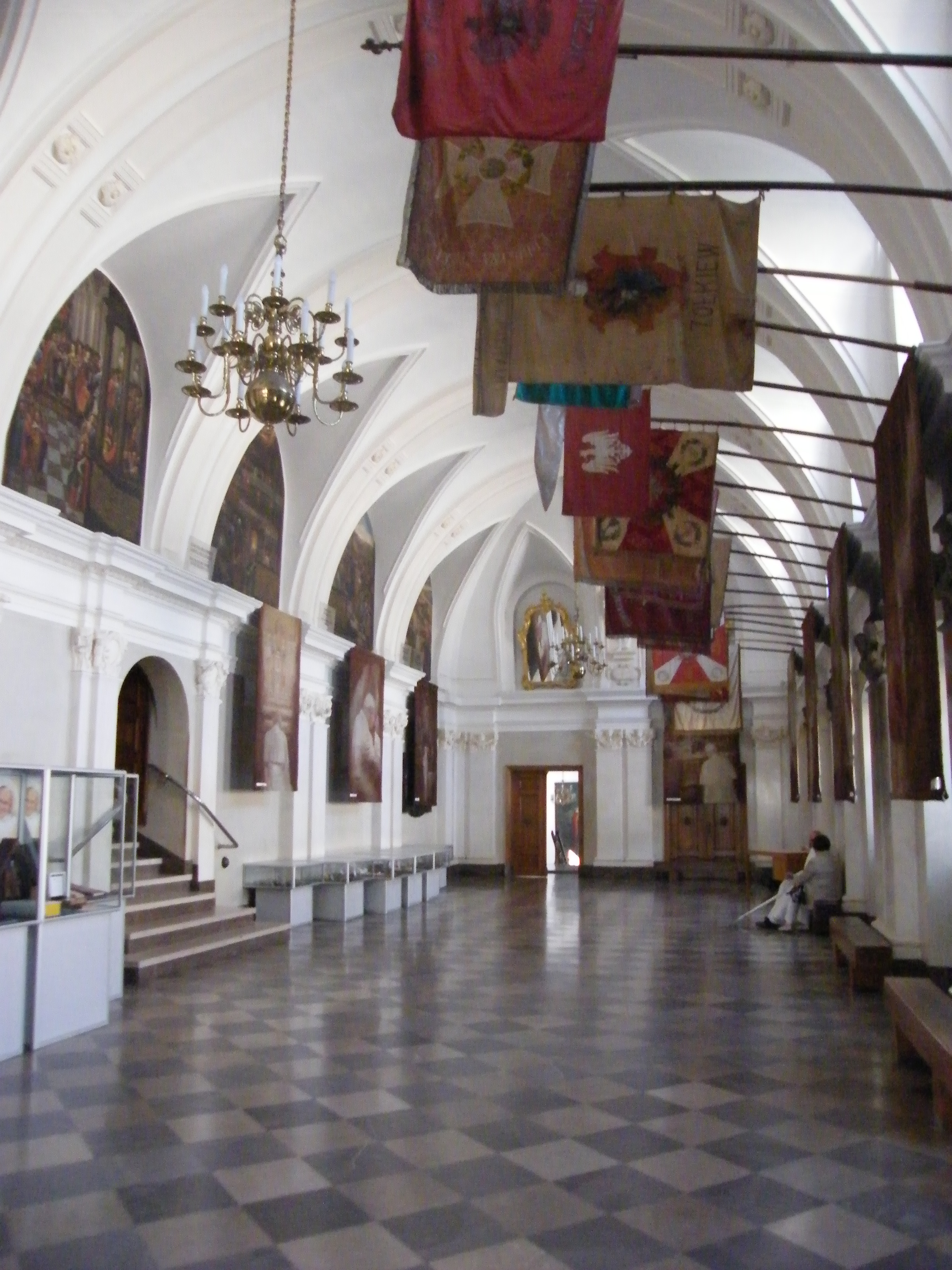 Częstochowa, klasztor, 1633-1650, XVIII